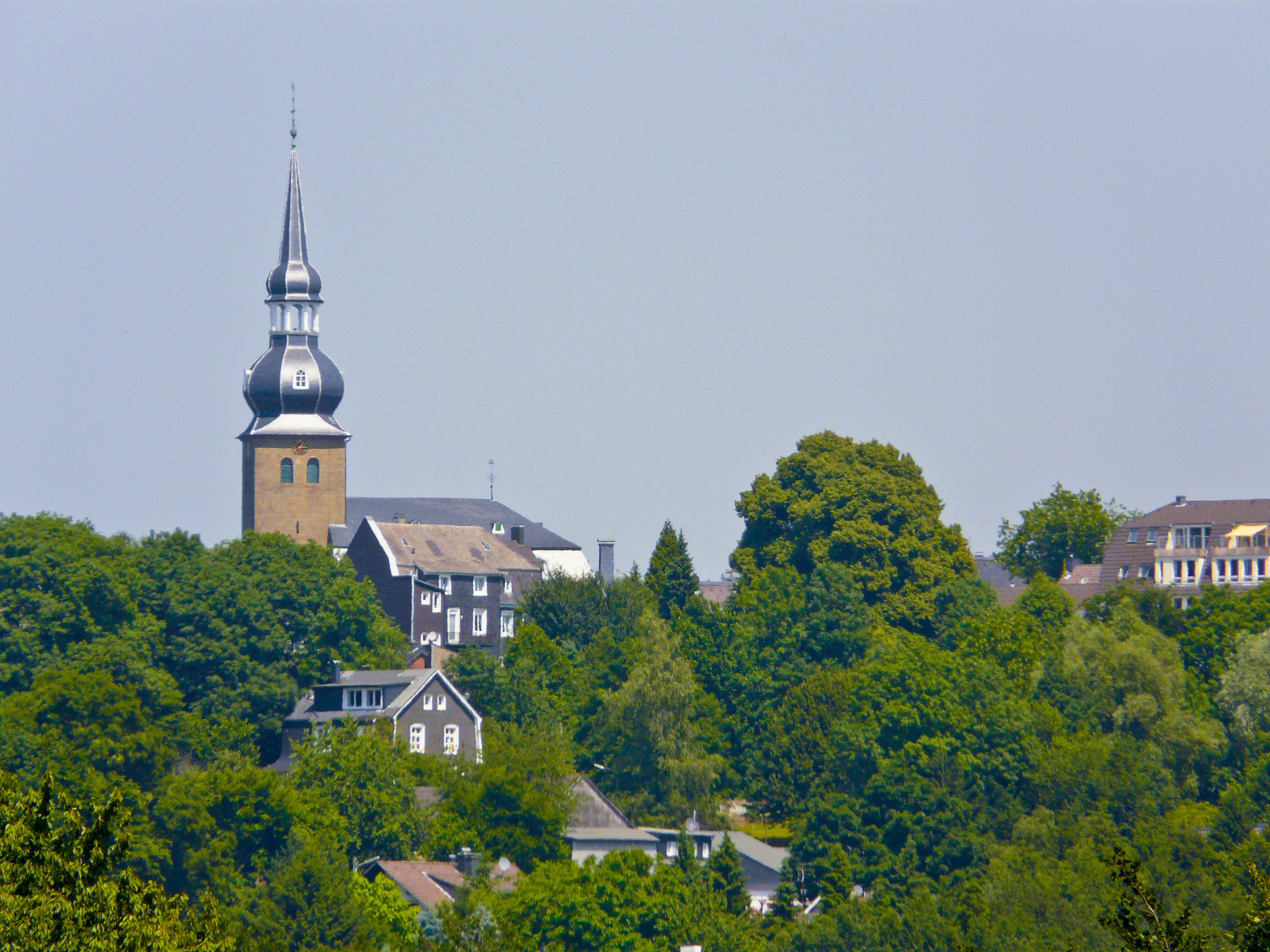 Reformierte Kirche Wuppertal Cronenberg, Ansicht von Süden This is a photograph of an architectural monument.It is on the list of cultural monuments of Wuppertal